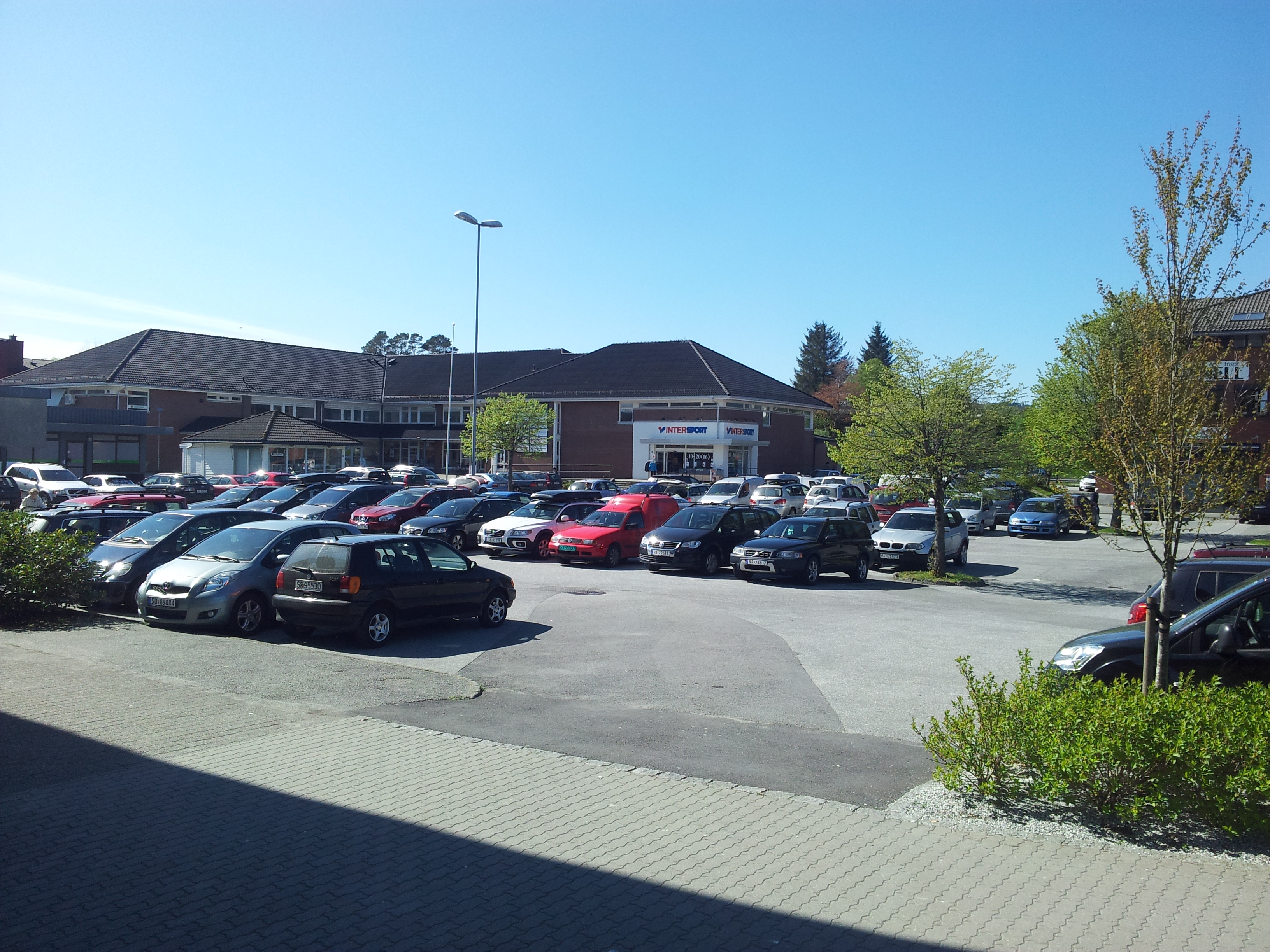 Frekhaug, Meland, Norway